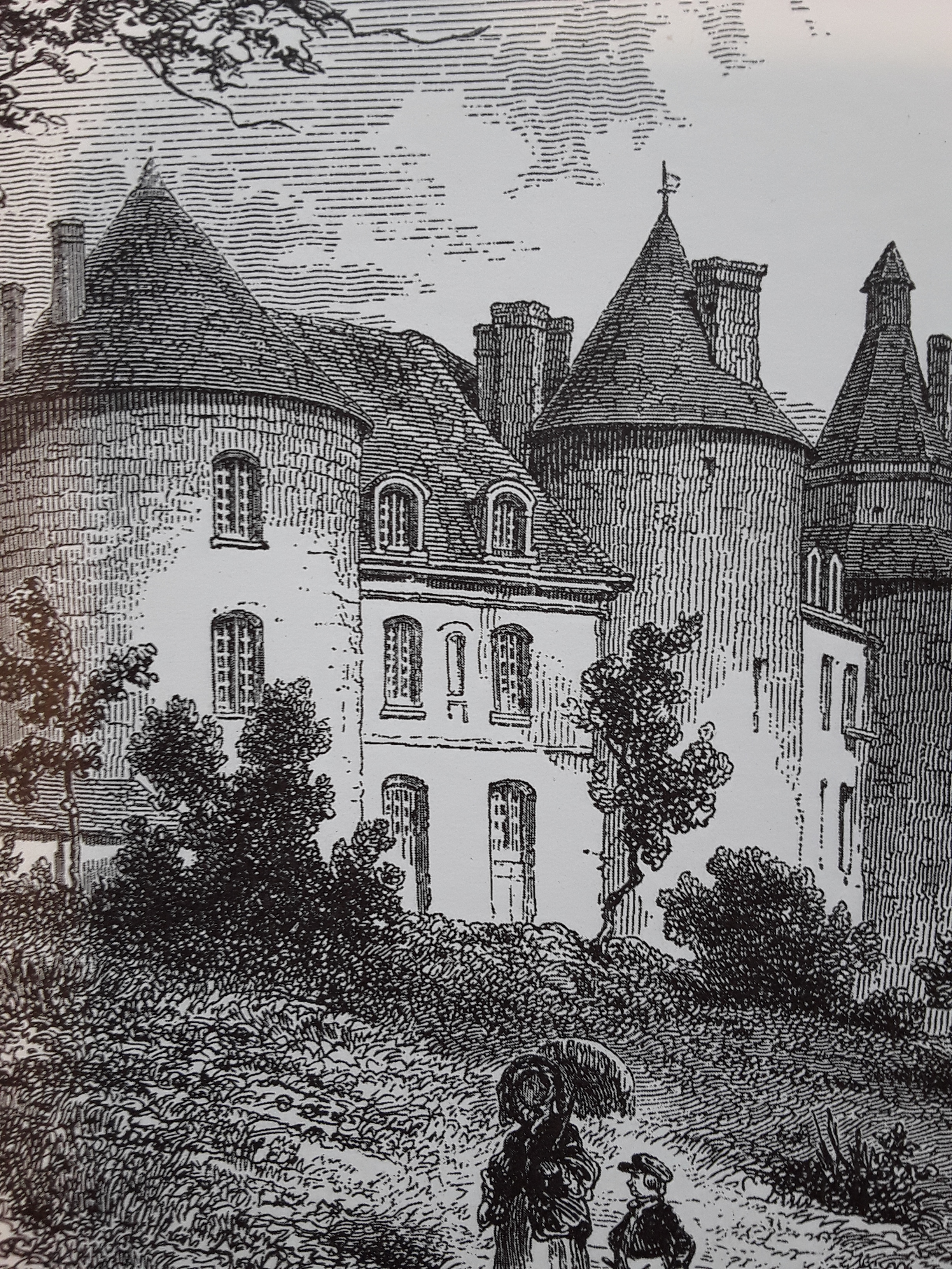 Carte postale représentant le château de Grillemont vers 1830, La Chapelle-blanche-saint-Martin, Indre-et-Loire, France